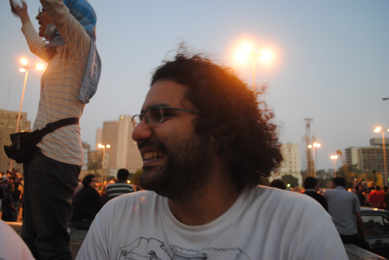 Alaa Abdel Fatah in Tahrir Square